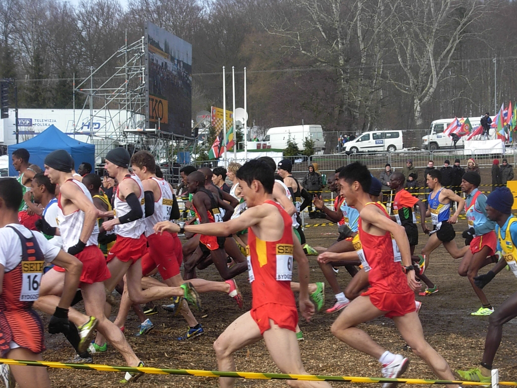 Mistrzostwa Świata w Biegach Przełajowych IAFF 2013 w Leśnym Parku Kultury i Wypoczynku Myślęcinek w Bydgoszczy